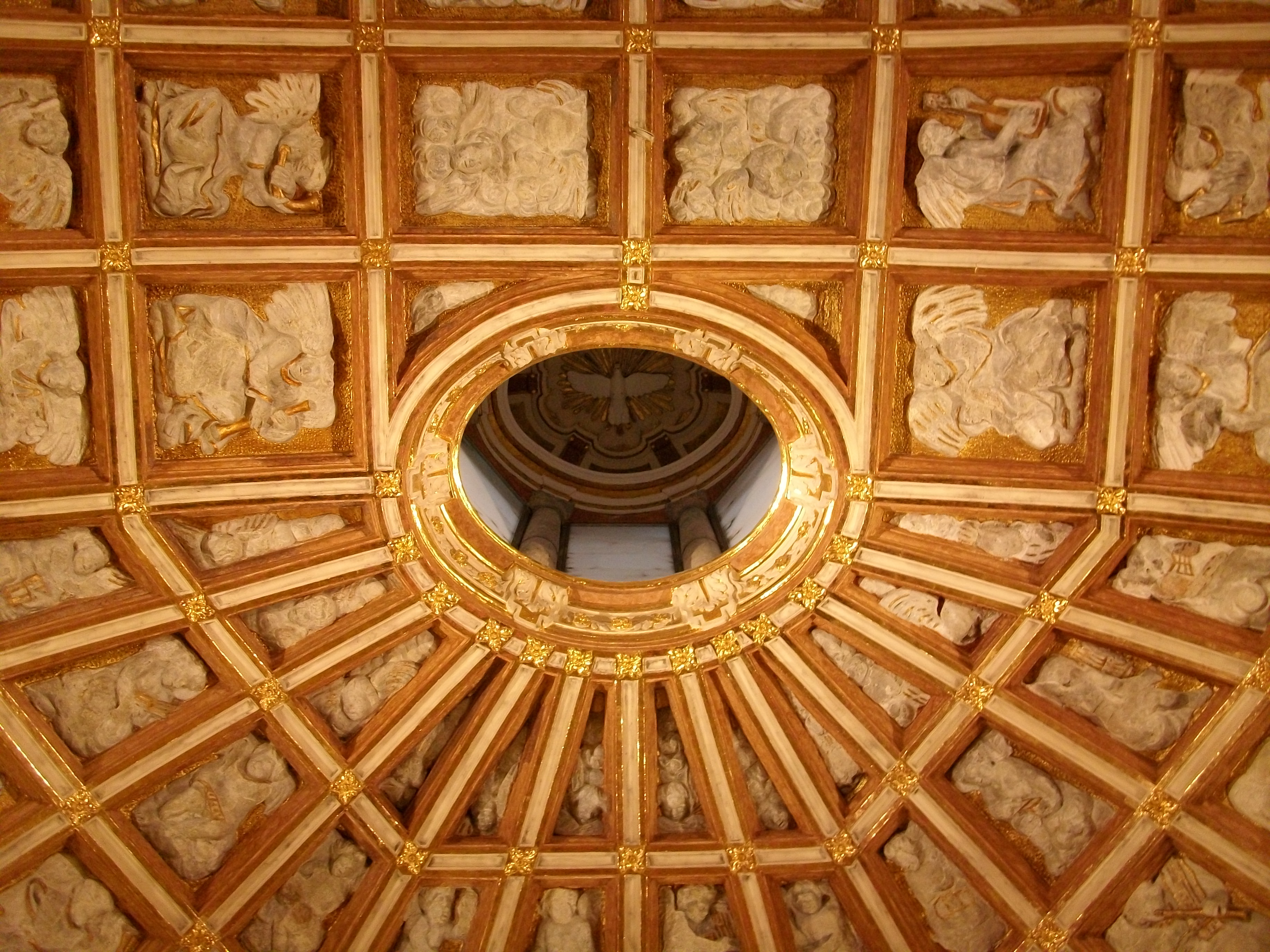 Detall de la capçalera renaixentista de l'església de Sant Martí de València.